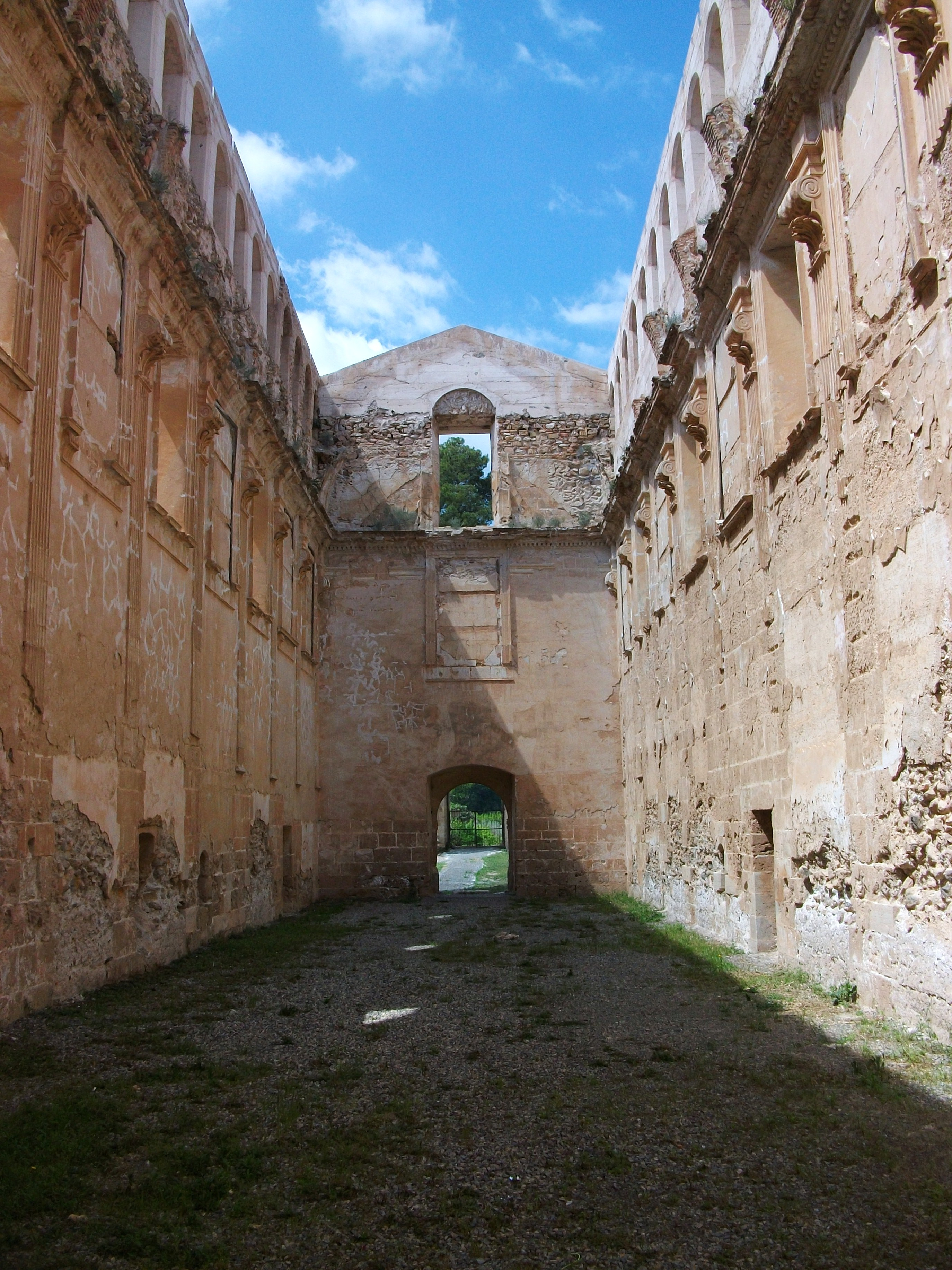 Vista de cap als peus de l'església de la Mare de Déu dels Àngels de la cartoixa de Valldecrist.